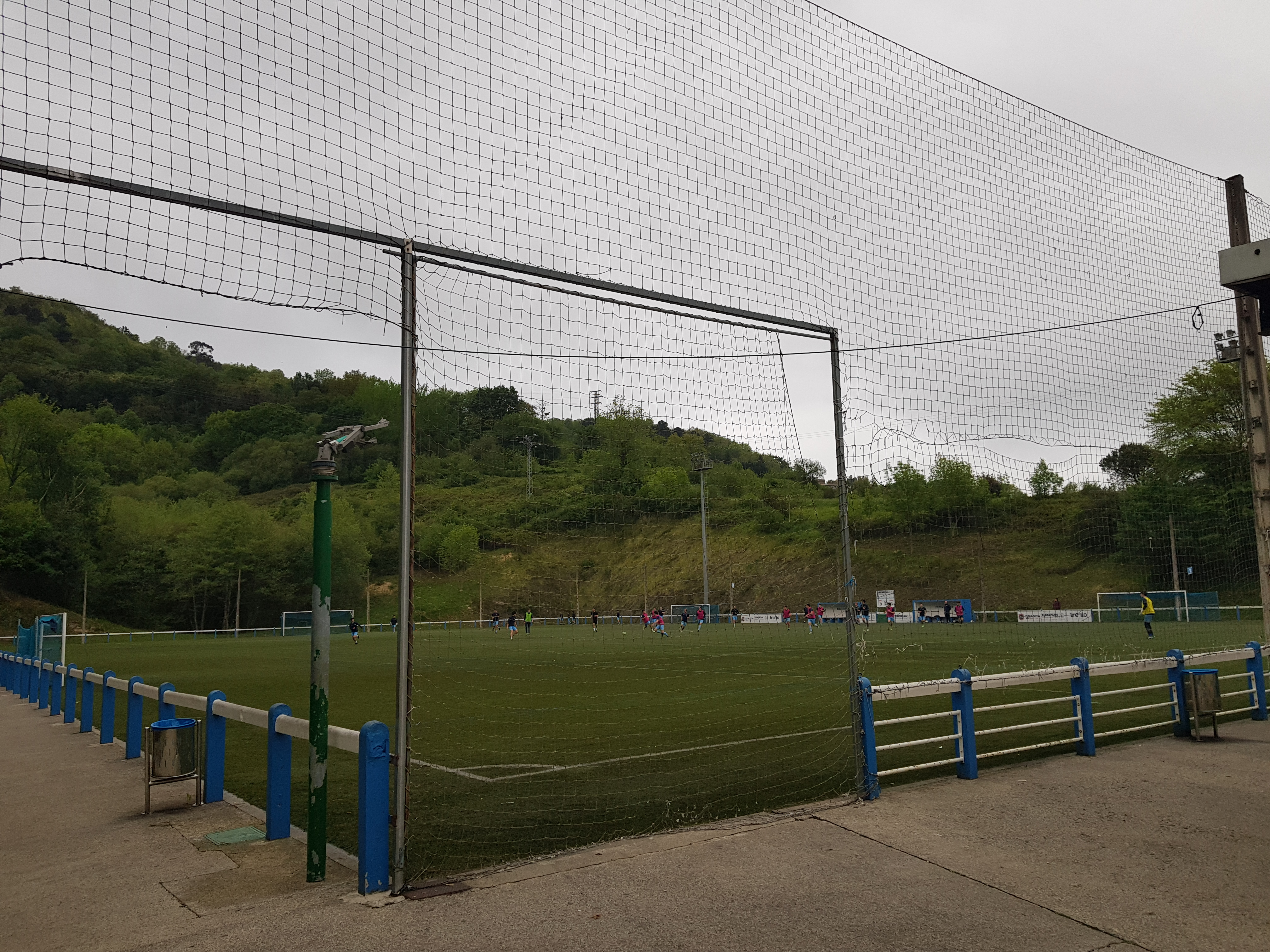 Futbol 11-ko zelaia